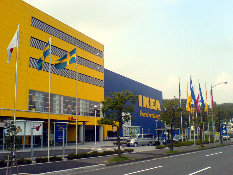 IKEA Kohoku Japan